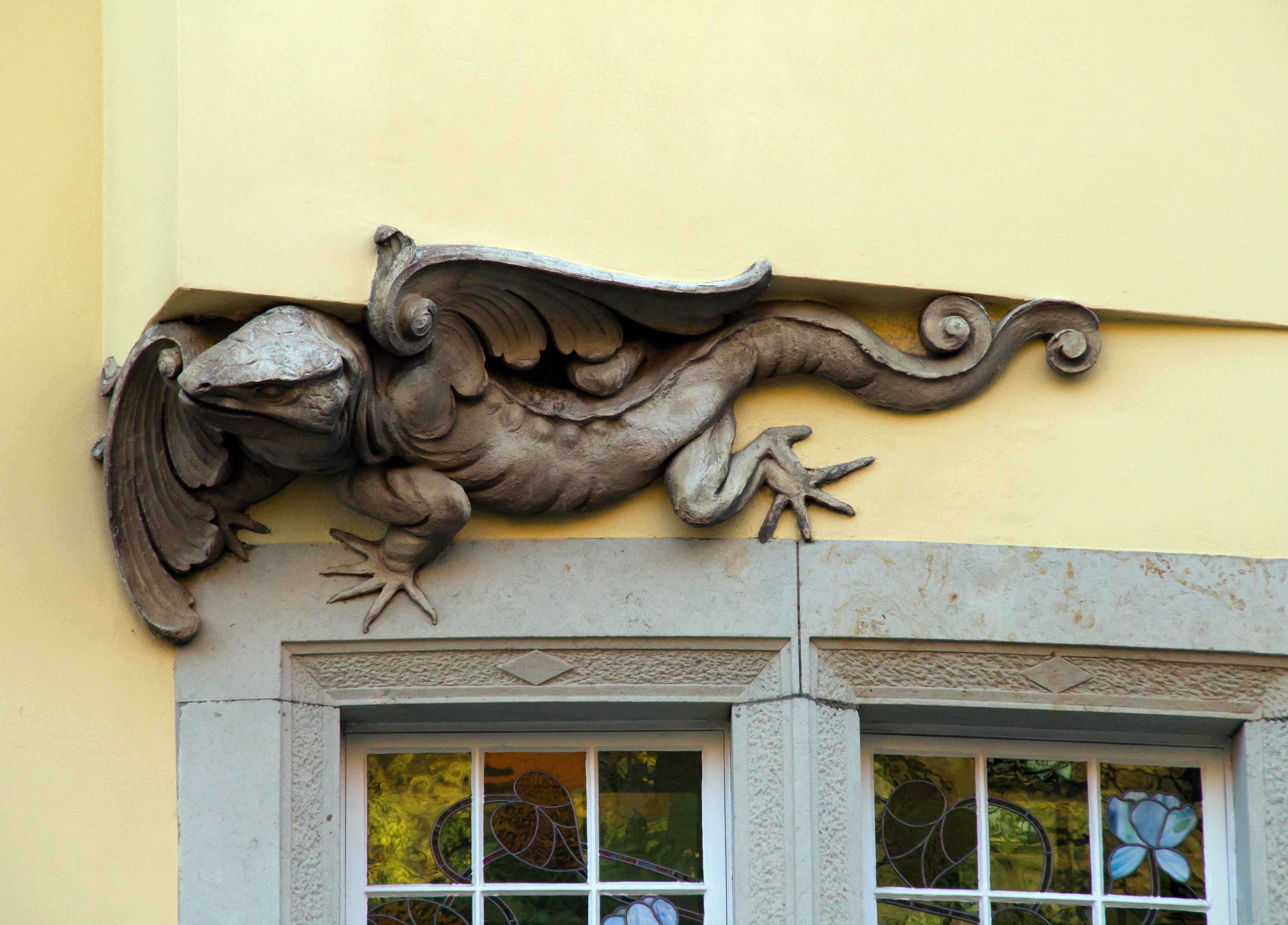 Mietshaus Eisenacher Straße 26 in Dresden. Detail.